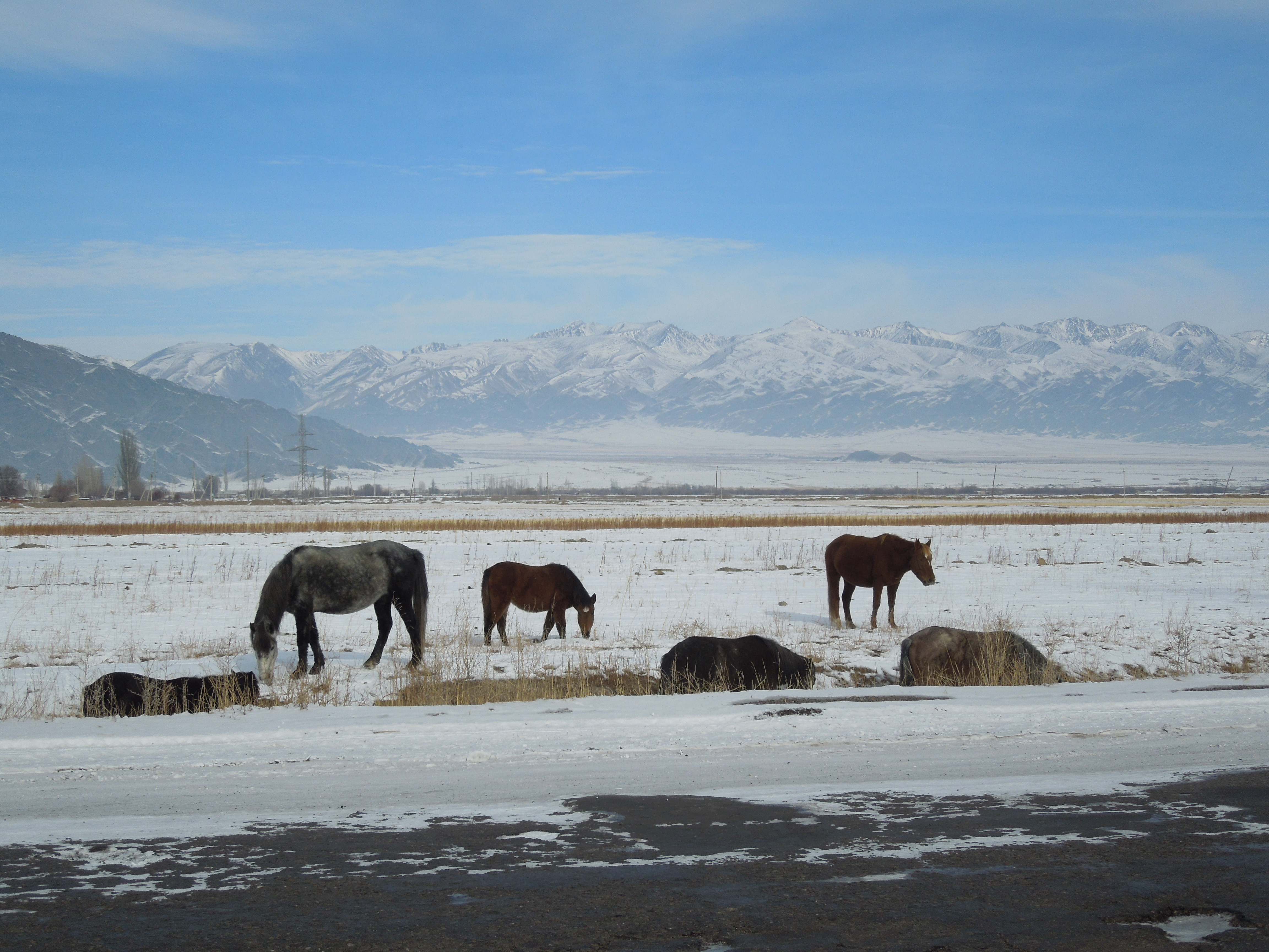 Horses on winter pasture near Cholpon, Kochkor rayon, Naryn oblast, Kyrgyzstan